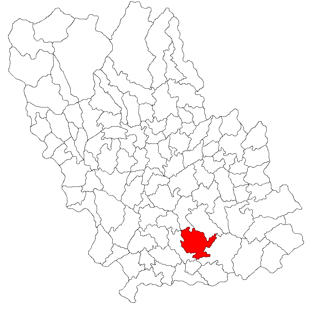 Categorie:Hărţi ale judeţului Prahova